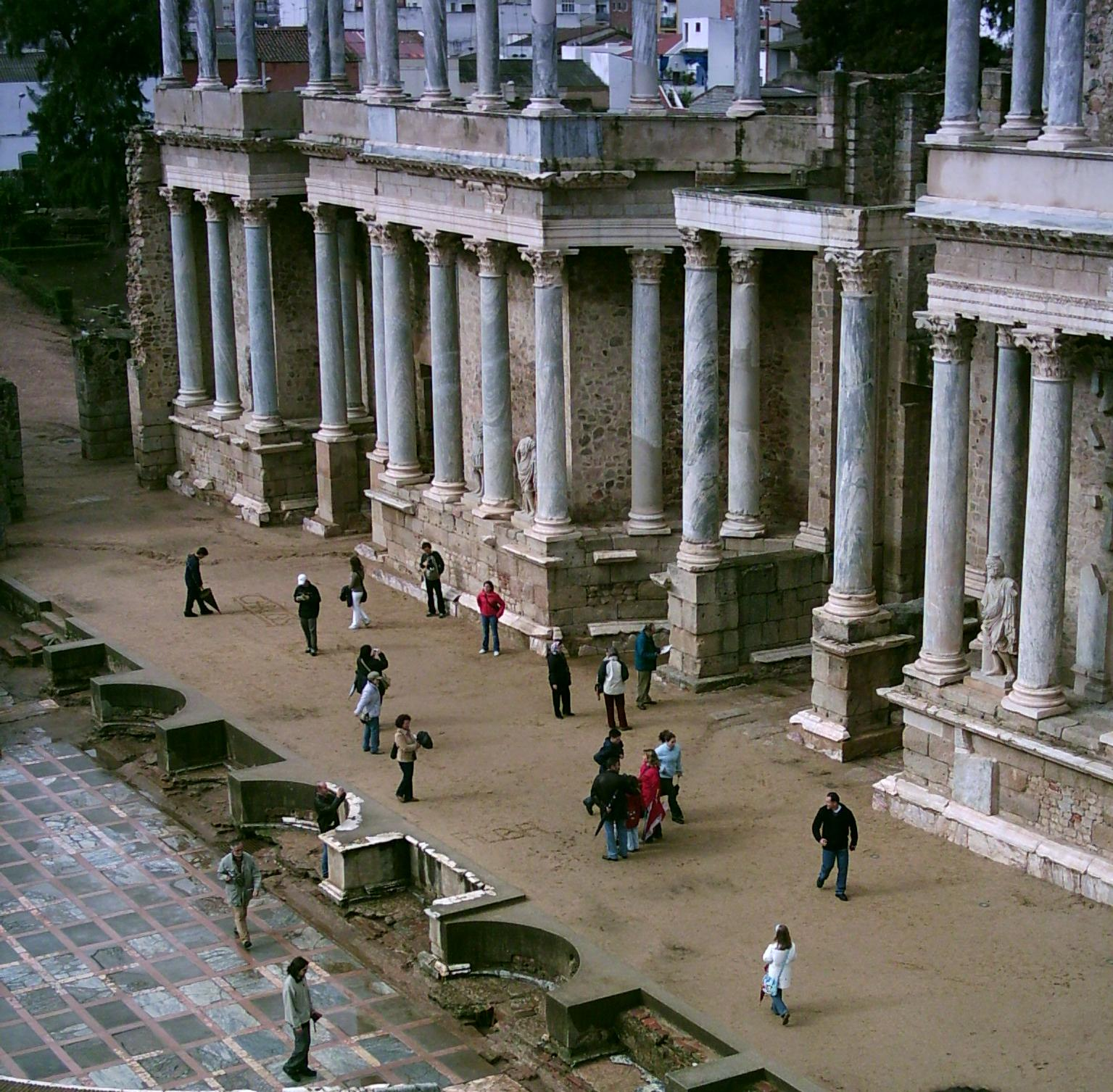 Teatro romano de Mérida